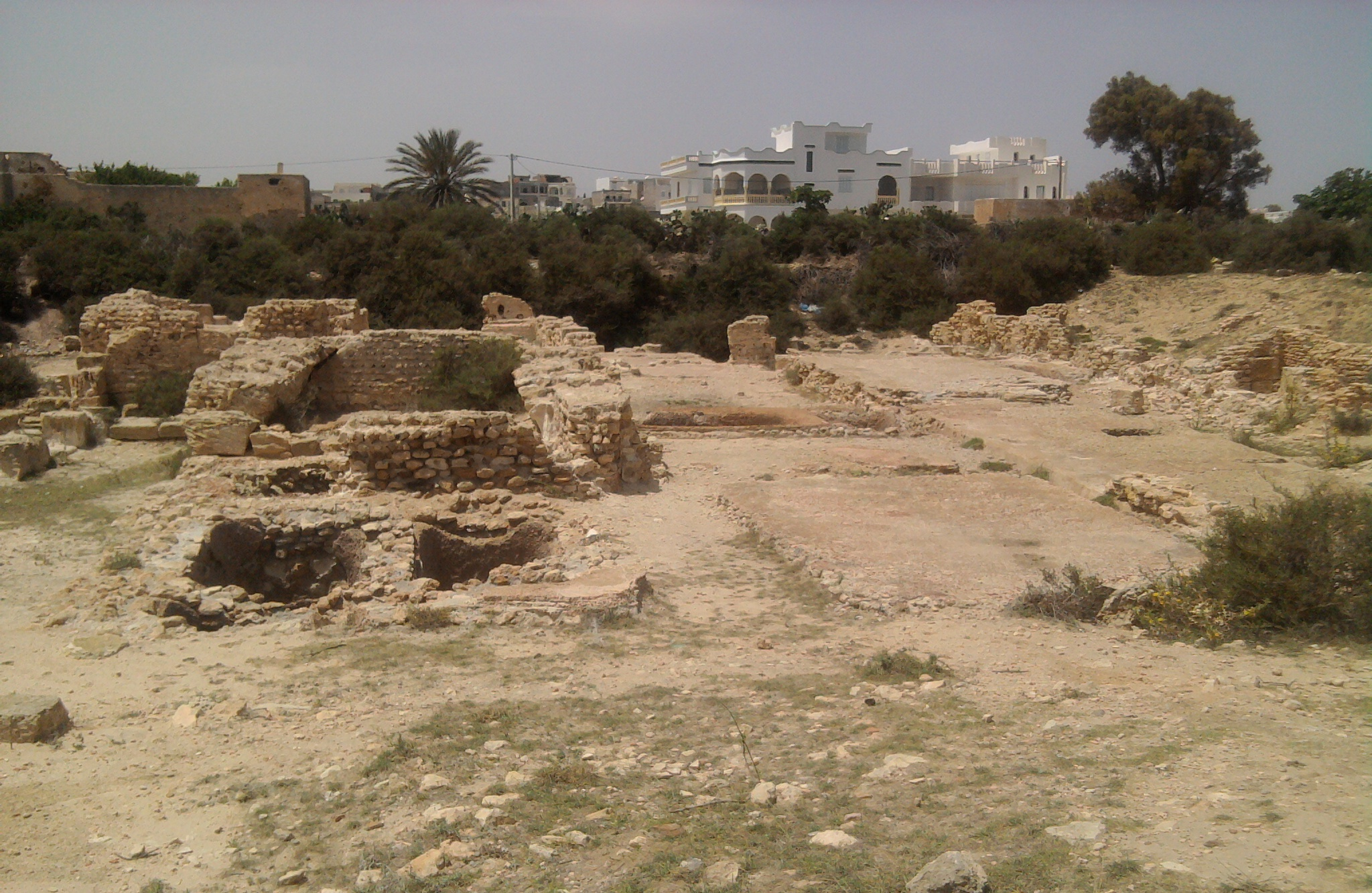 Tunisie, Ruines à Salakta